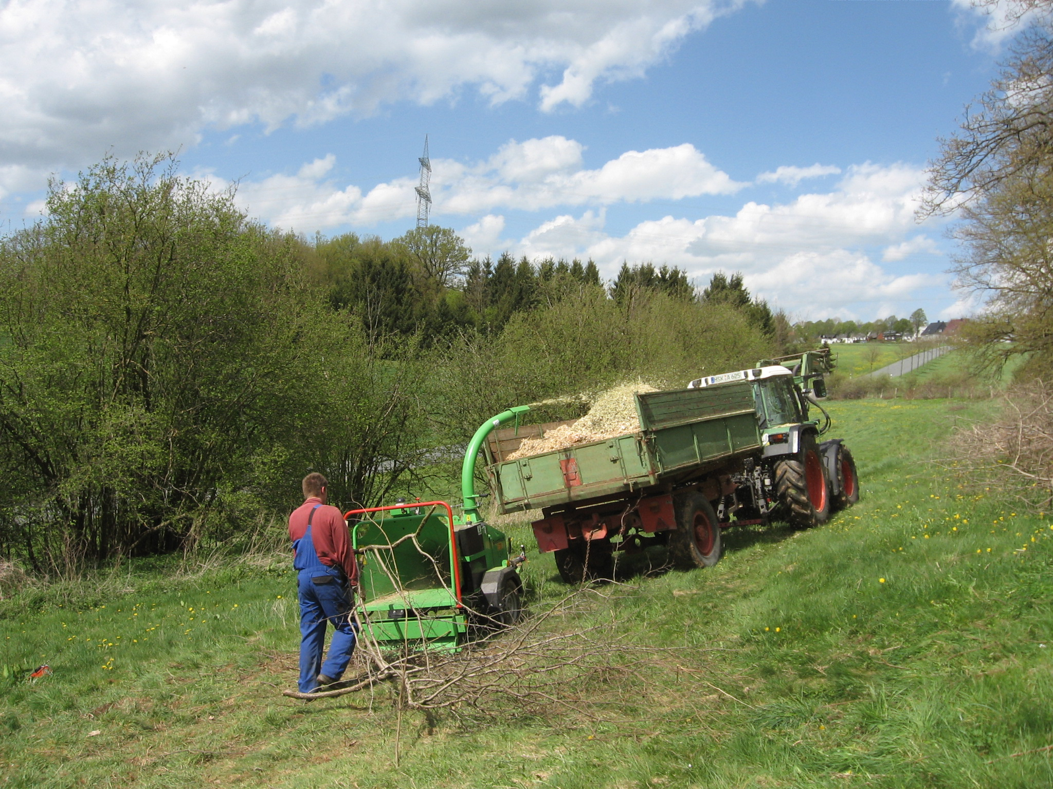 Häckseln von bei Landschaftspflegearbeiten im Bereich Lehmkuhle im Landschaftsschutzgebiet Magergrünlandkomplex südlich Wülfte vom Landschaftspflegetrupp der Biologischen Station Hochsauerlandkreis abgesägter Gehölze.